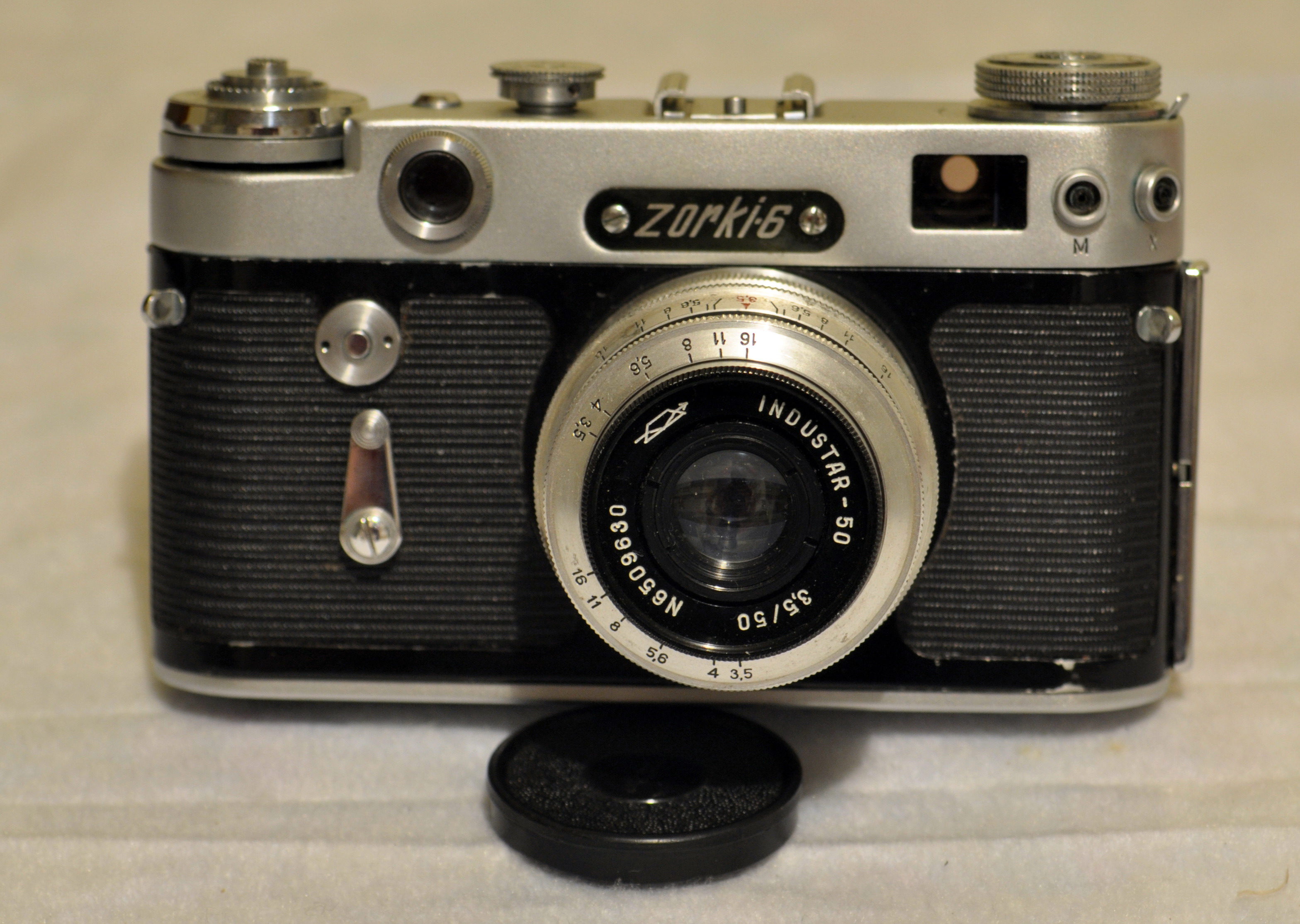 Zorki - 6